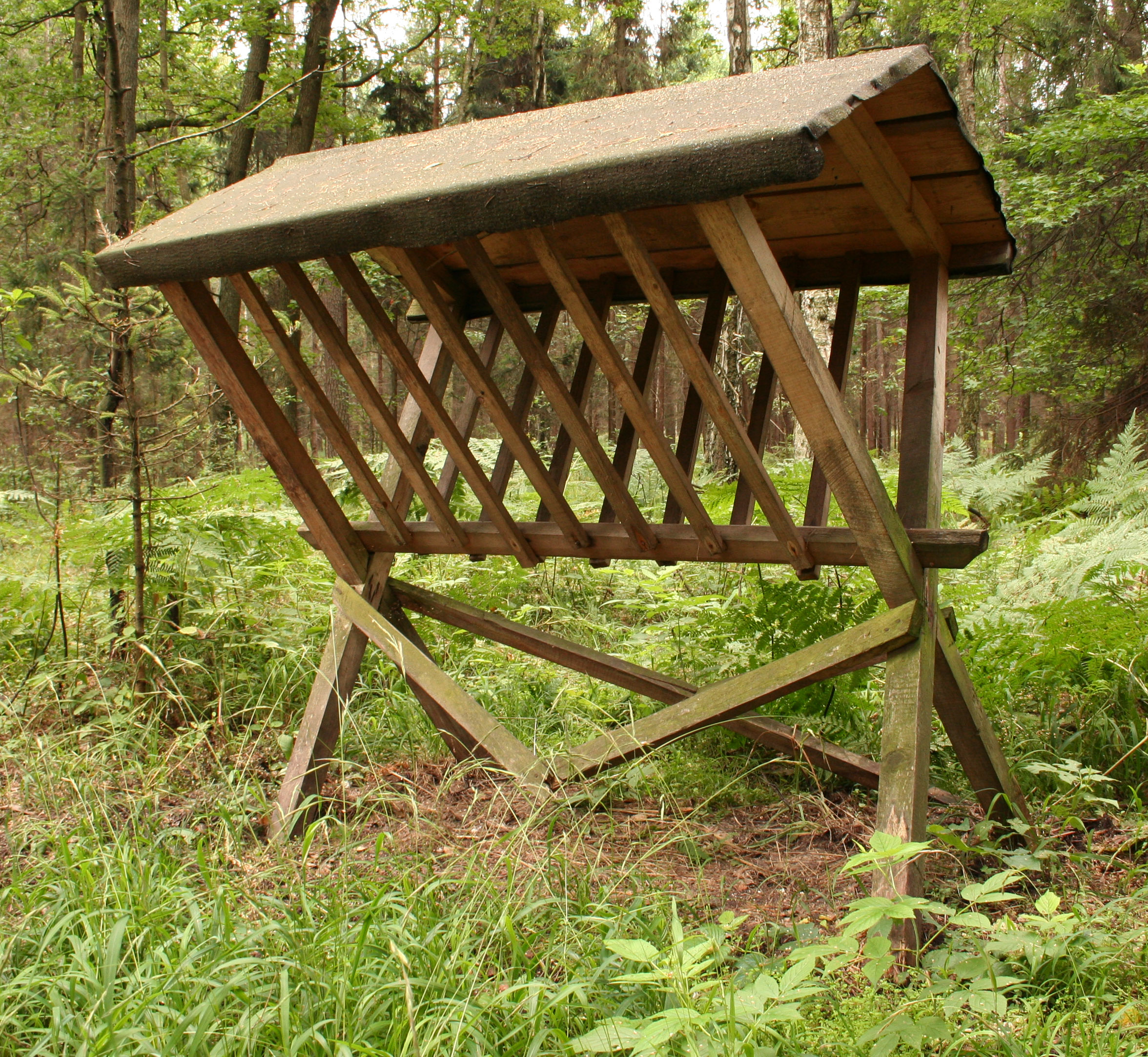 Paśnik